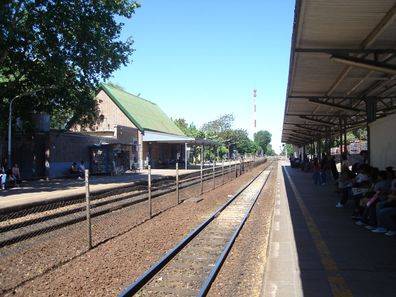 Vista de la estación Munro del Ferrocarril General Belgrano de la red ferroviaria argentina desde la plataforma descendente. La estación, inaugurada en 1912, homenajea a un administrador del Ferrocarril Central Córdoba y con el tiempo dio nombre a la localidad que sirve.